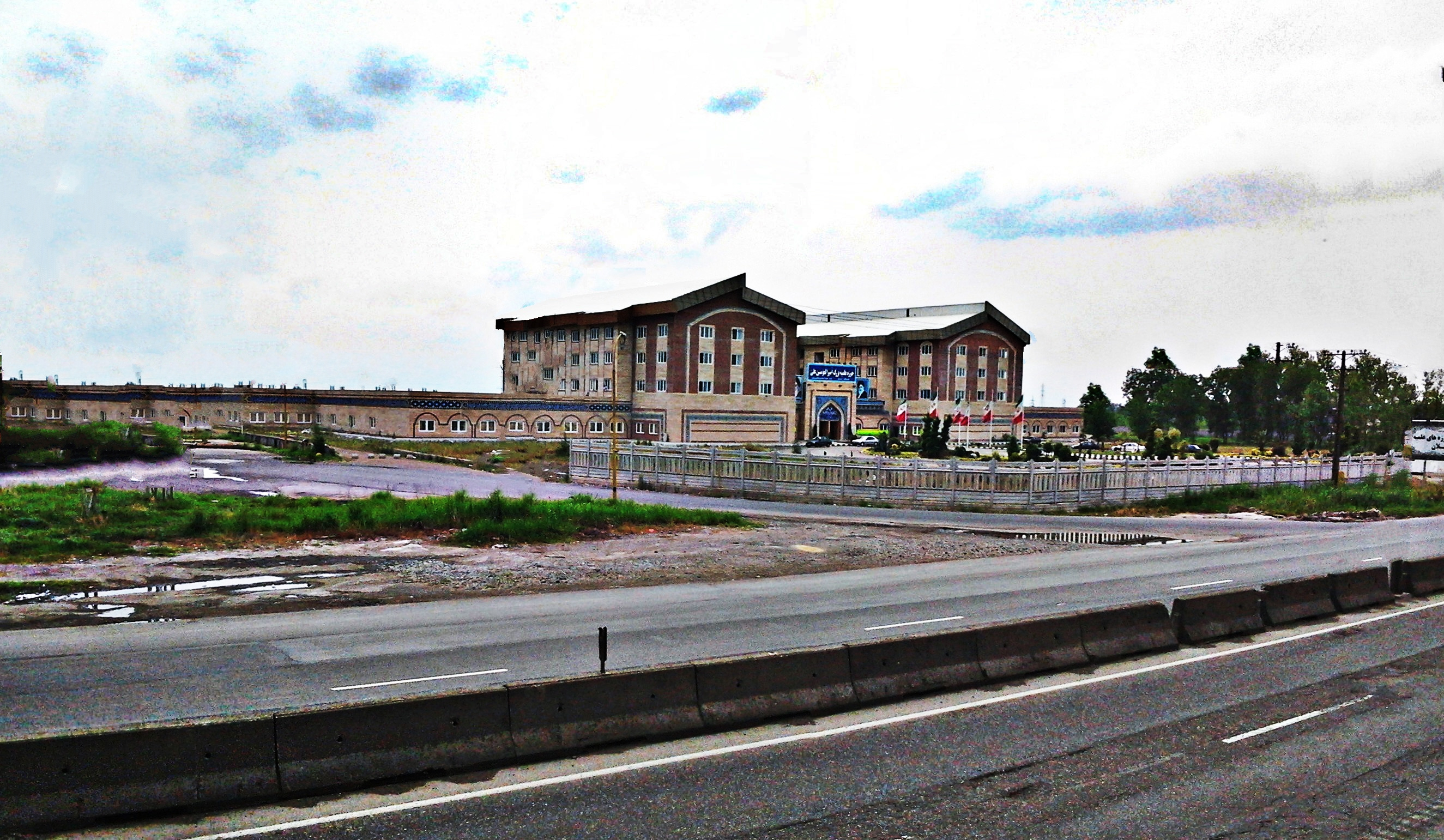 فاز یک حوزه علمیه ی امیر الموءمنین رشت مجاور بزرگراه خلیج فارس(بزرگترین حوزه علمیه ی خاور میانه)